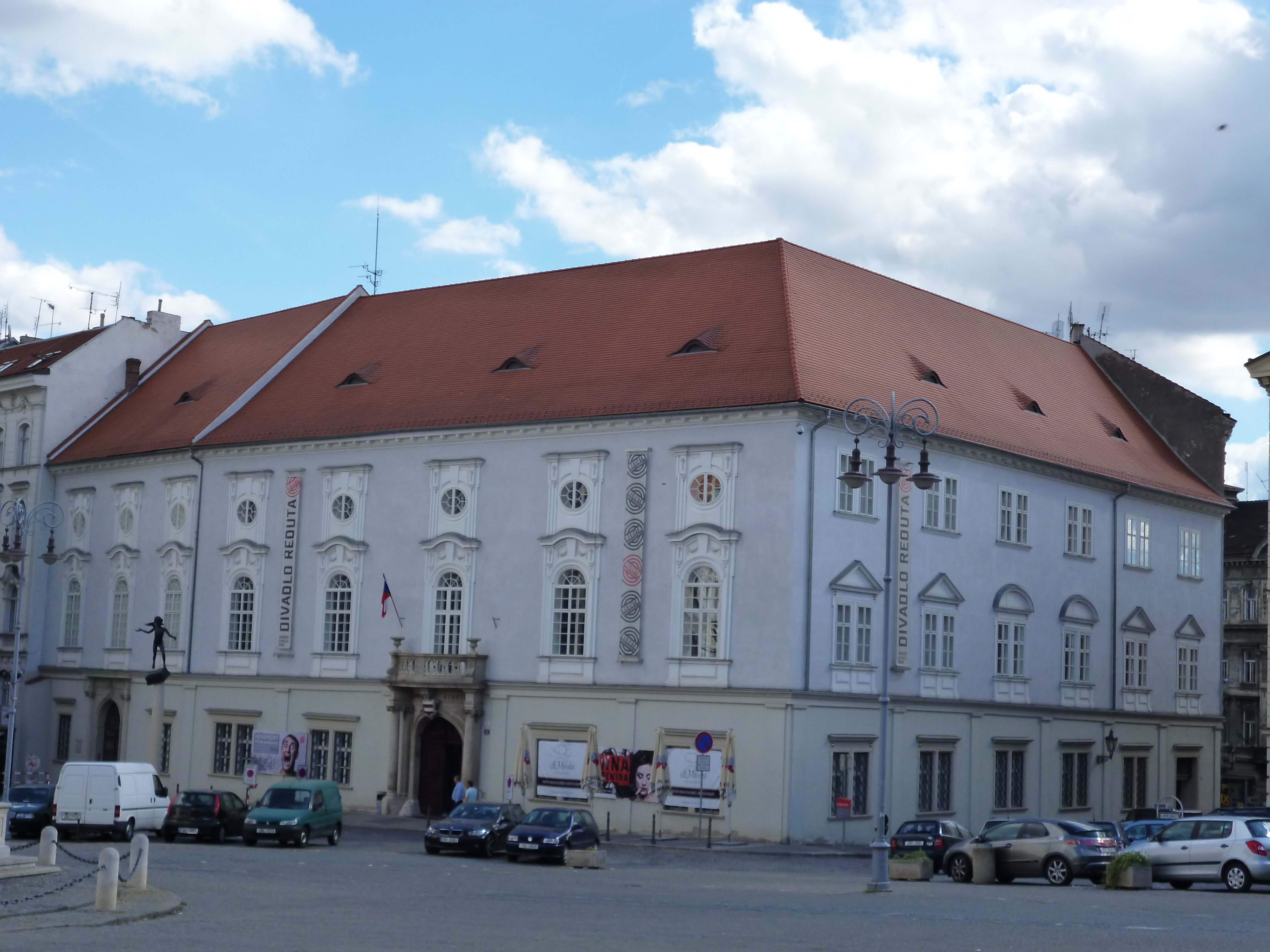 Divadlo Reduta (Brno), Brno - město, Zelný trh 313/4, Brno